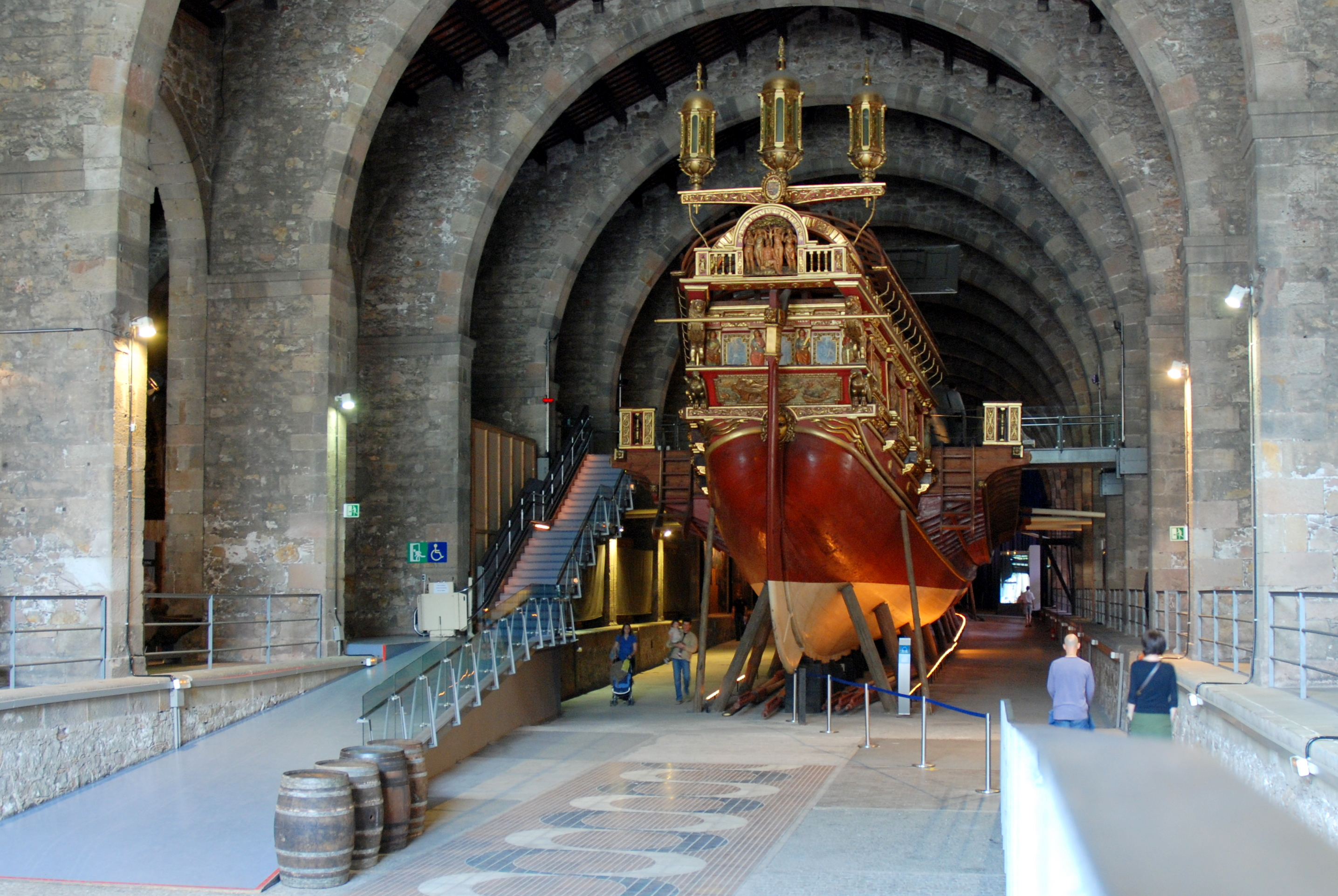 De Real, het vlaggenschip van Juan van Oostenrijk, in het Museu Marítim de Barcelona